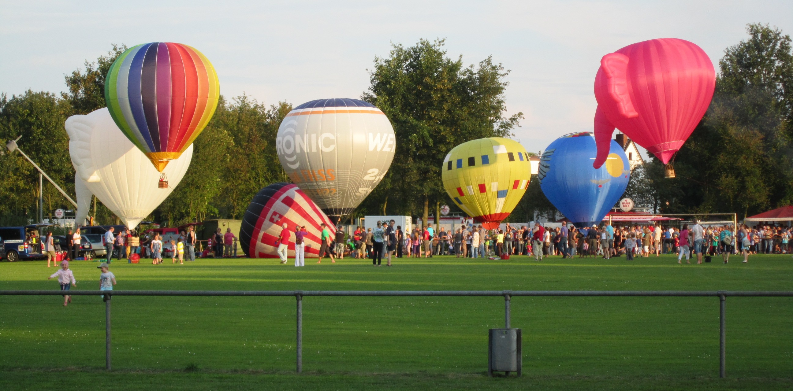 Barnstorfer Ballonfahrer-Festival